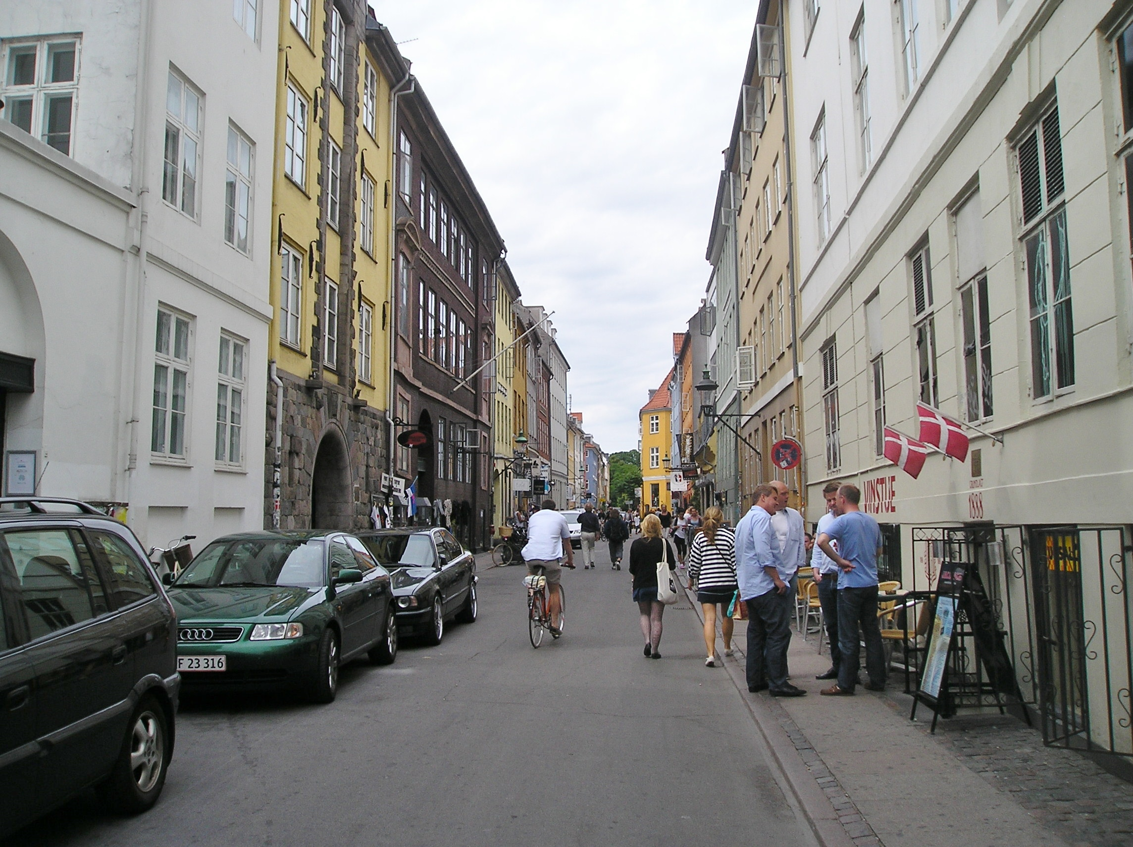 The street Larsbjørnstræde in Copenhagen.